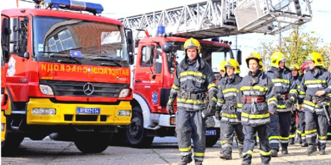 Професионалне ватрогасне јединице у оквиру Сектора за ванредне ситуације Министарства унутрашњих послова Републике Србије